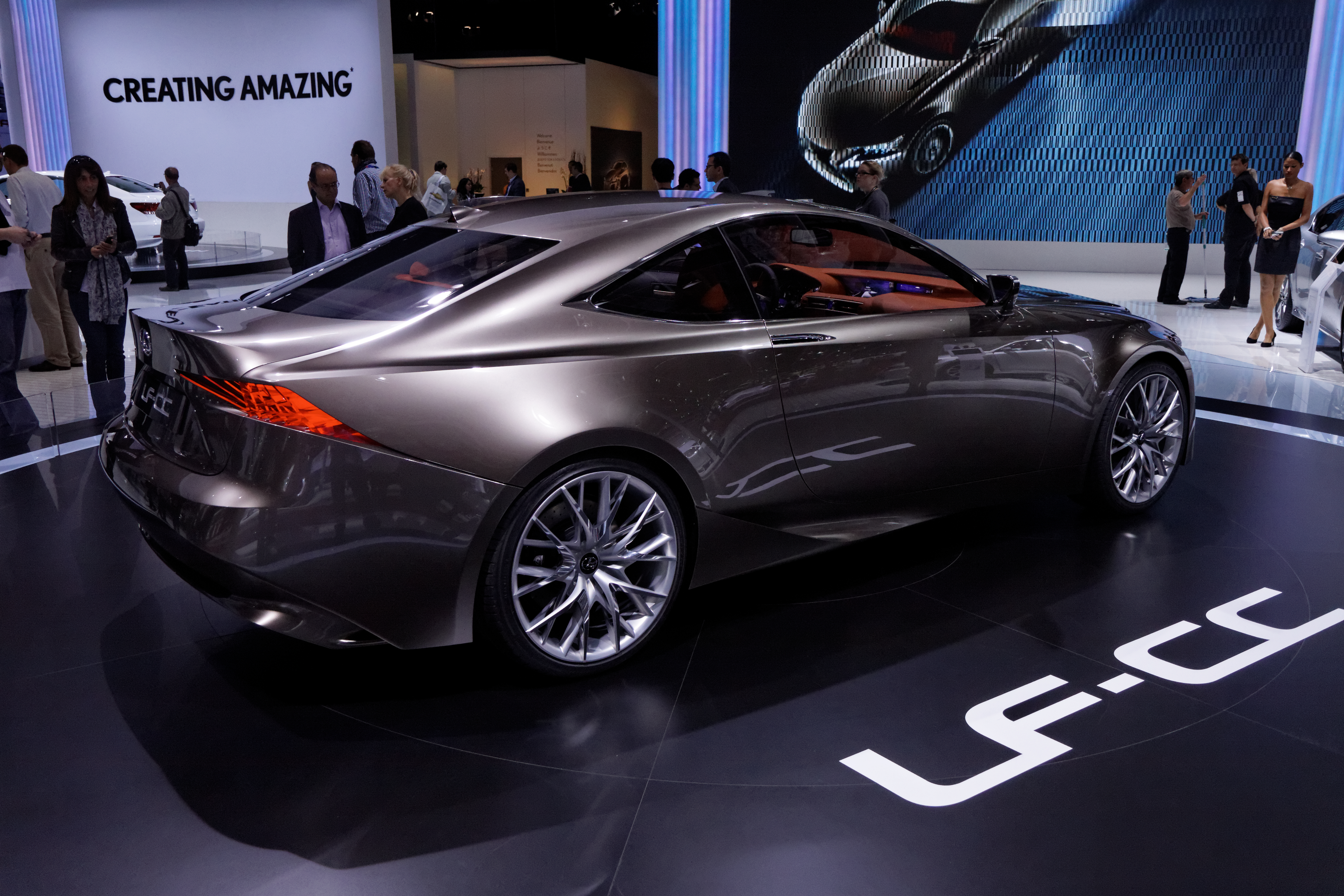 Une Lexus LF-CC présentée lors du Mondial de l'automobile de Paris 2012.